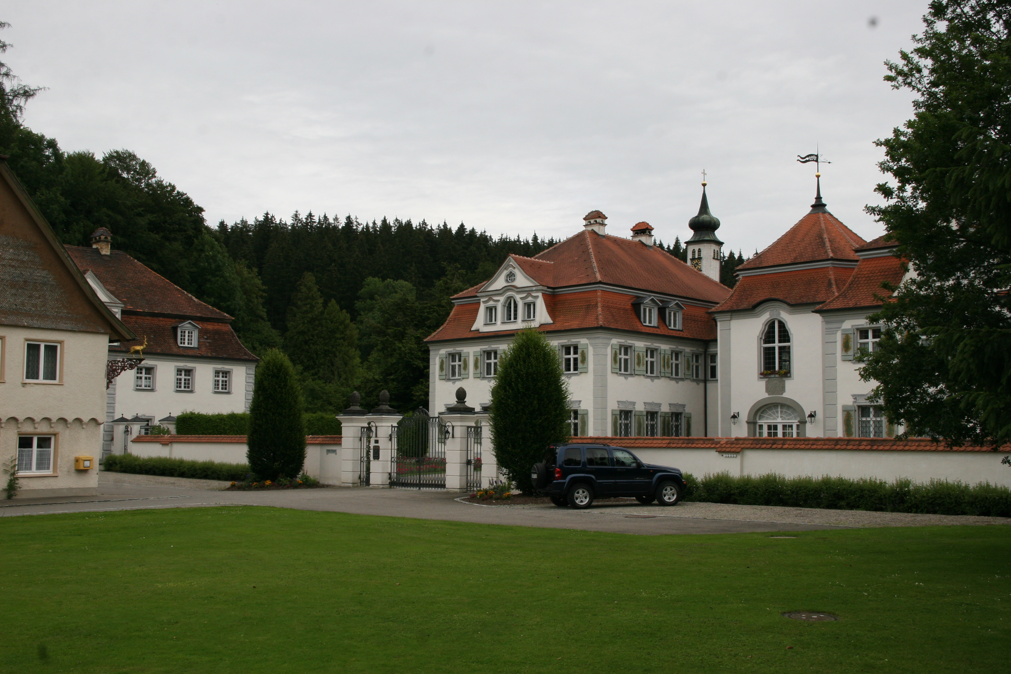 Vorderseite des Schlosses Rimpach